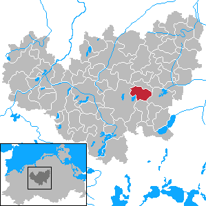 Groß Roge in Mecklenburg-Vorpommern - District Güstrow